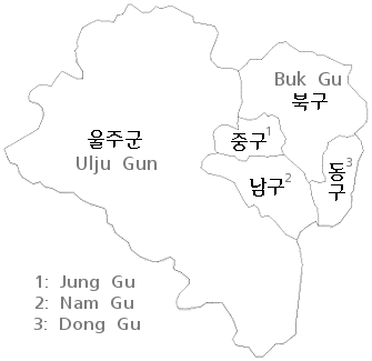 Ulsan's administratieve gebieden.